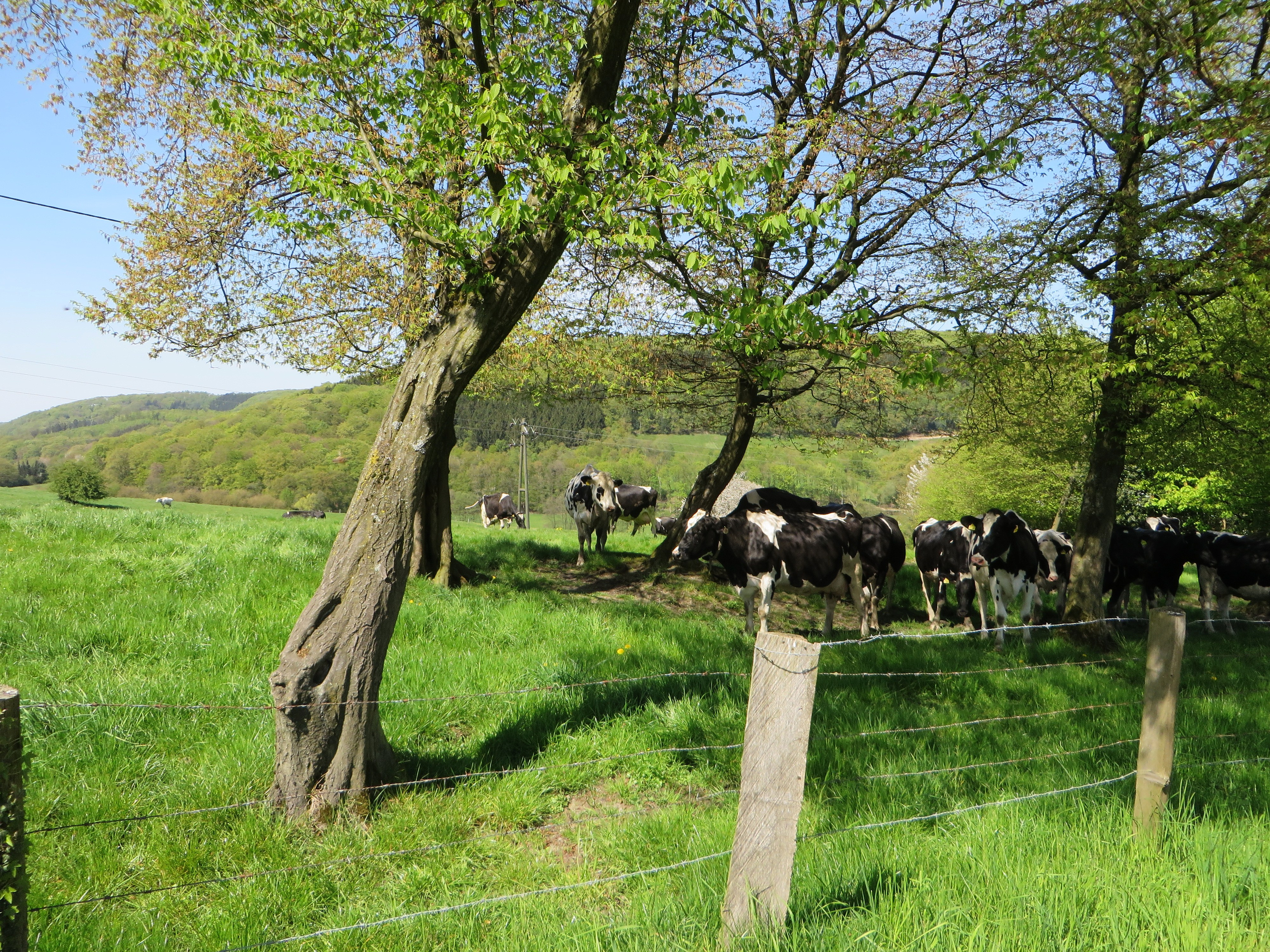 Kühe auf der Weide von Hof Fahrentrappe (erstmals 1005 erwähnt) im Hattinger Ortsteil Oberelfringhausen. Im Hintergrund, oberhalb vom Felderbach, der Kreiswald mit dem Sahlberg. Der abgebildete Bereich liegt im Landschaftsschutzgebiet „Niederbredenscheid-Elfringhausen“.